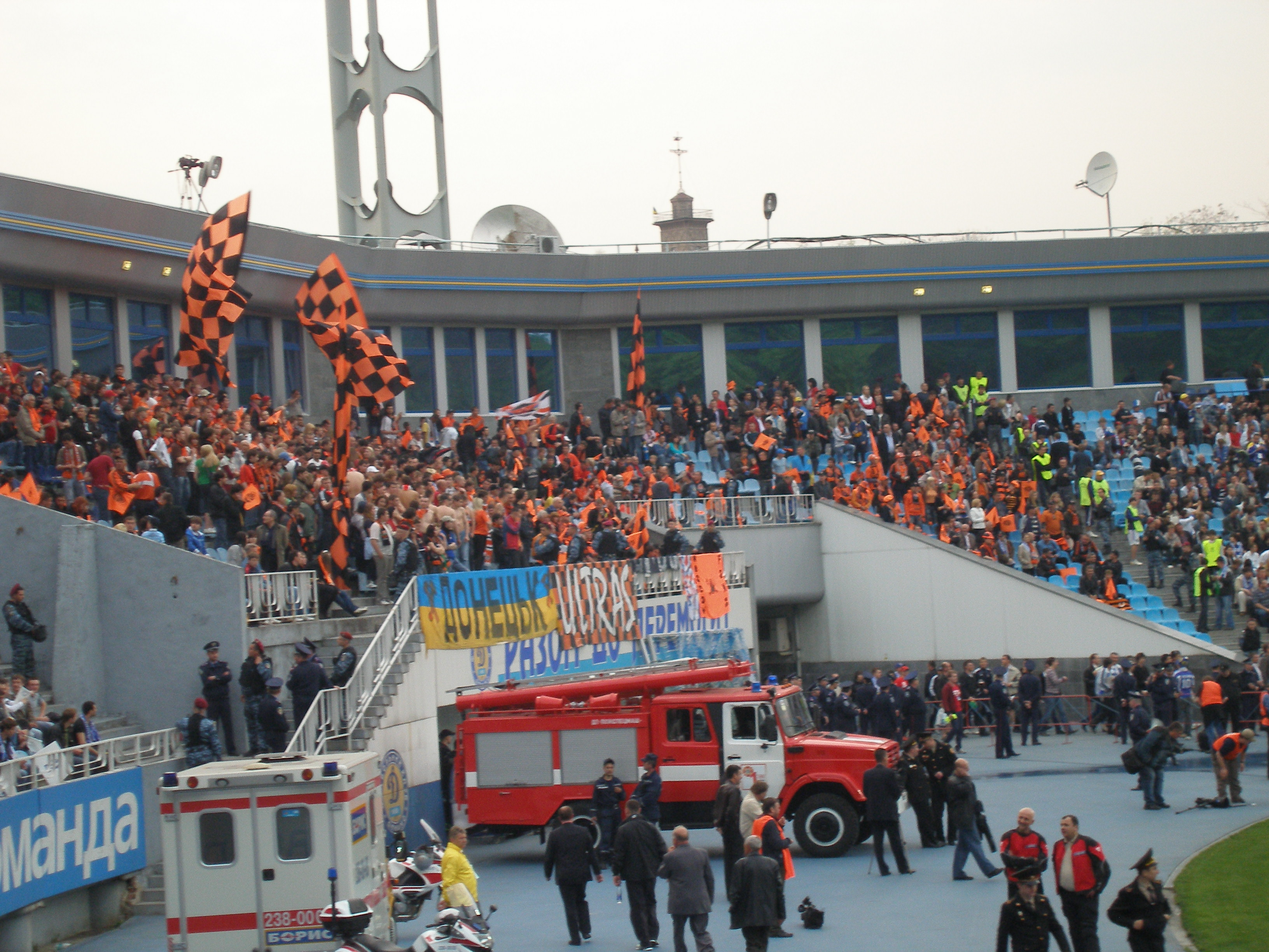 Уболівальники «Шахтаря» перед півфінальним матчем на Кубок УЄФА проти київського «Динамо»